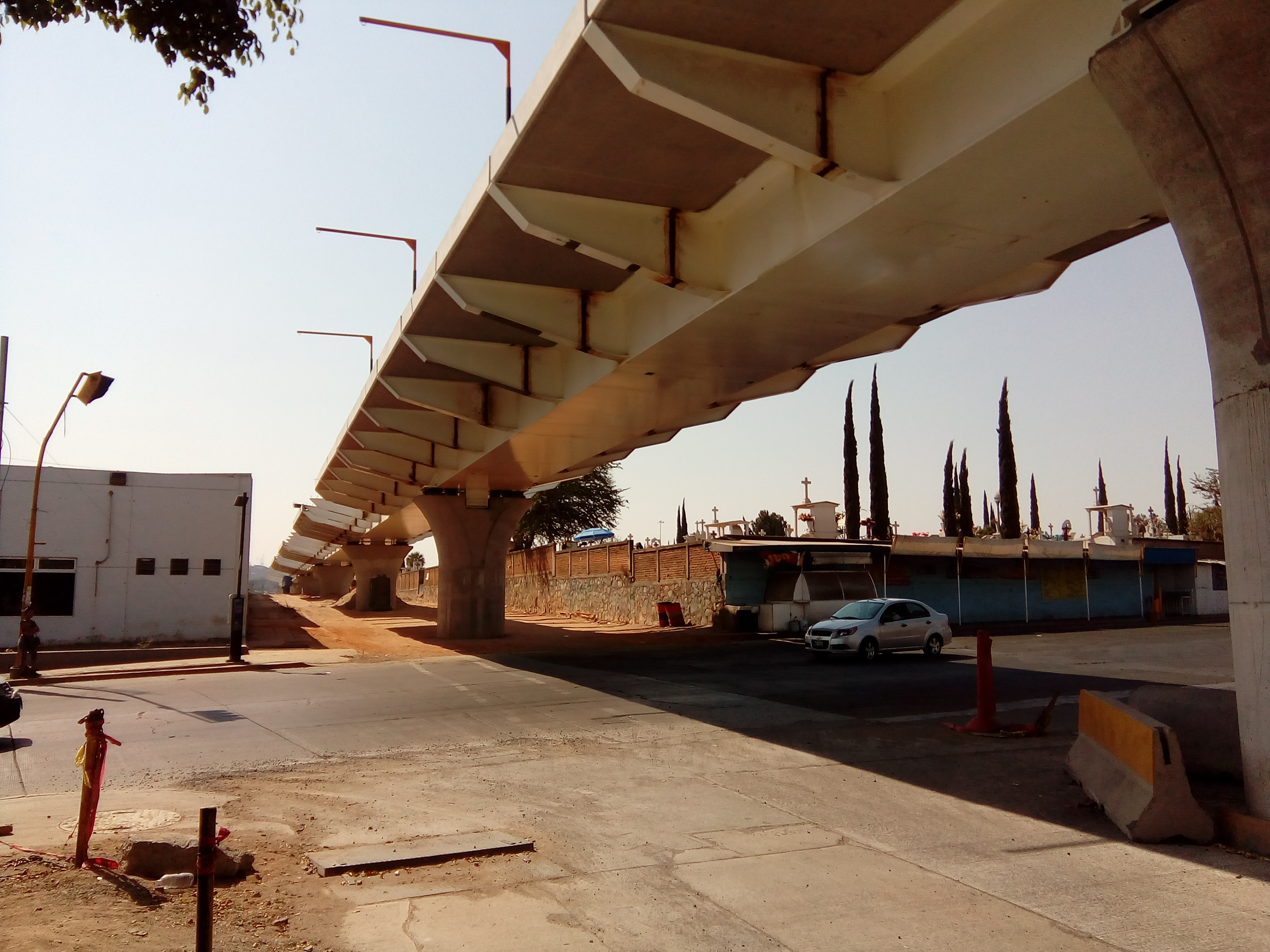 Rampa de conexión entre la estación Central Camionera y las cocheras/talleres de la Línea 3 del SITEUR